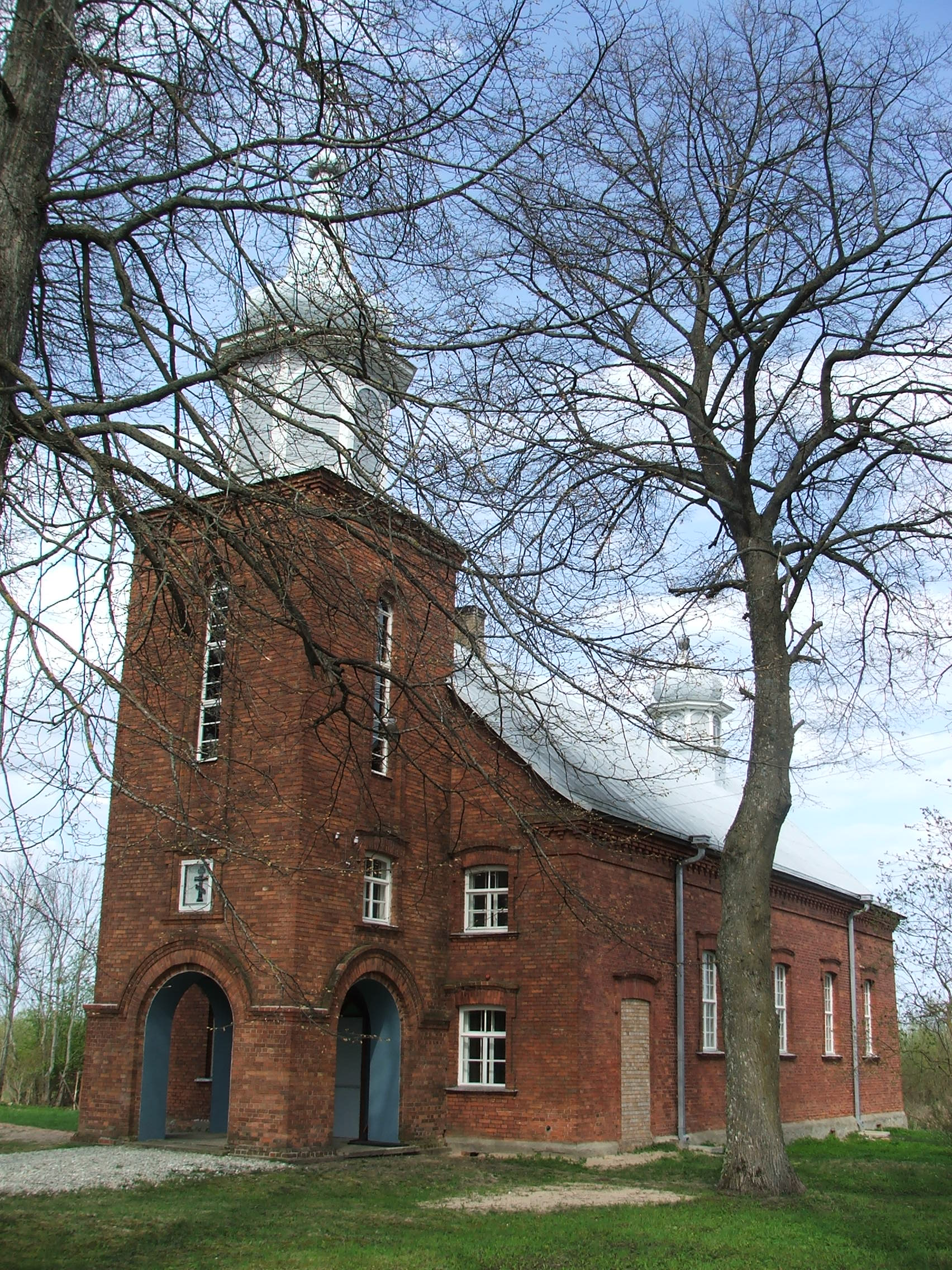 Kirik